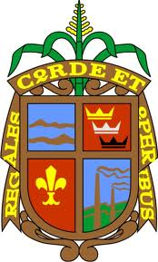 escudo de los reyes michoacan mexico